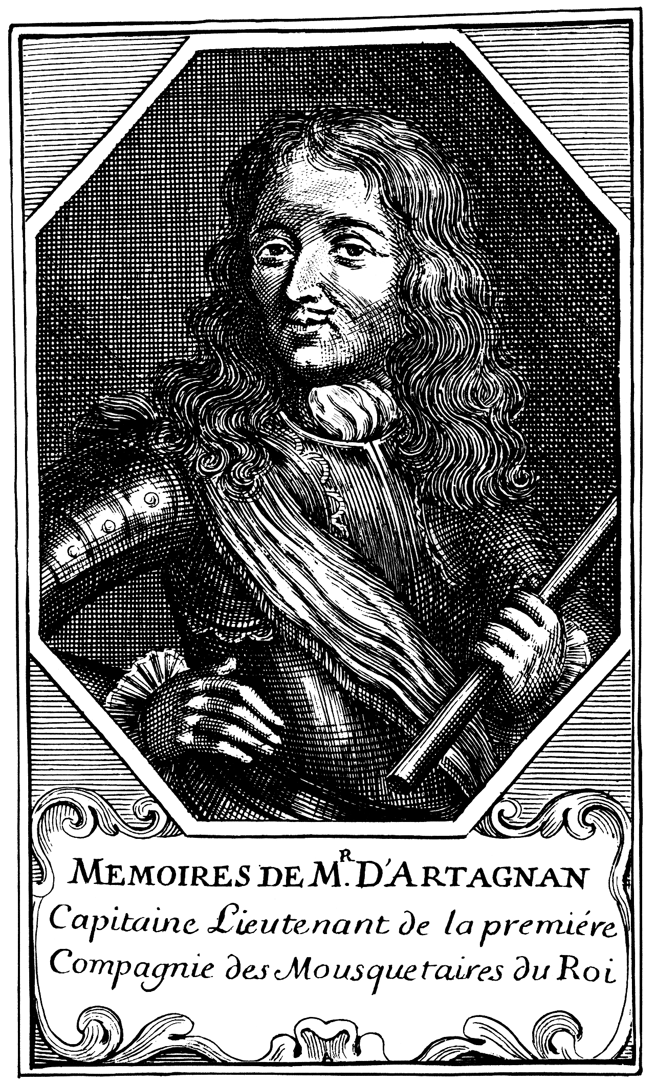 Frontispice de l’édition de 1704 des Mémoires de Monsieur d’Artagnan.